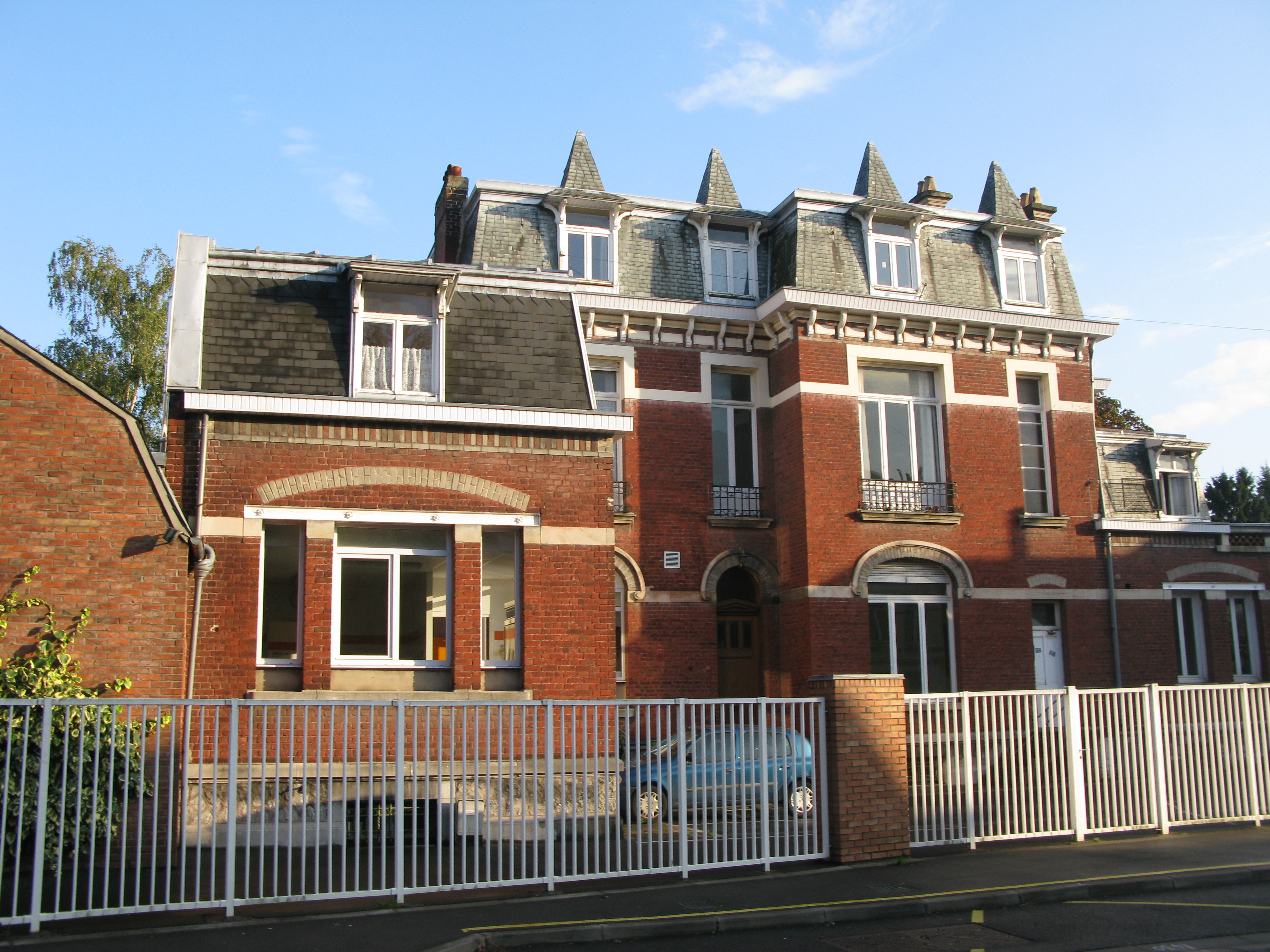 Institut Médico-pédagogique (IMP), 60 rue Gaston Baratte, à Villeneuve d'Ascq